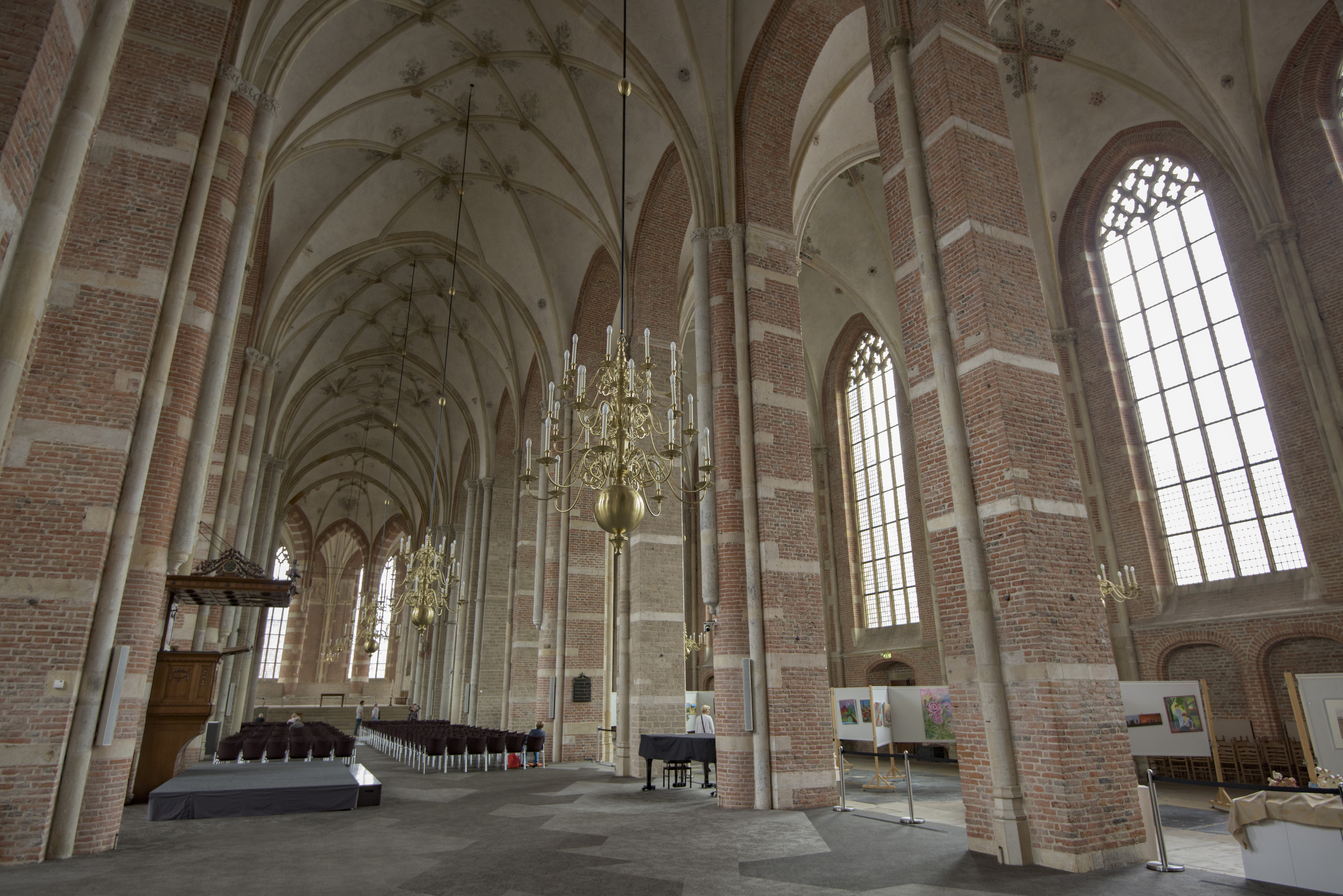 Interieur van de Grote of Lebuïnuskerk te Deventer.